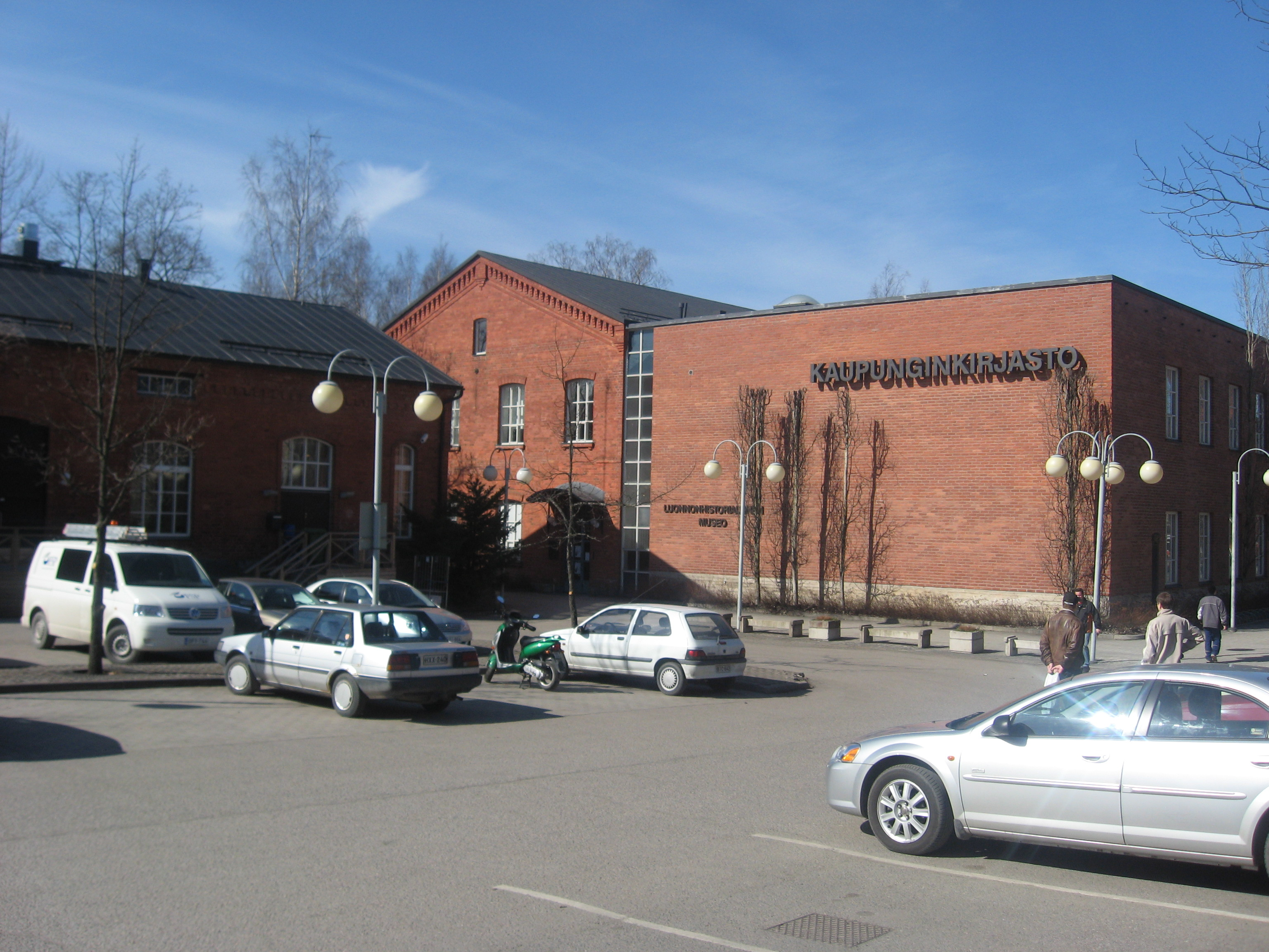 Forssan kaupunginkirjasto